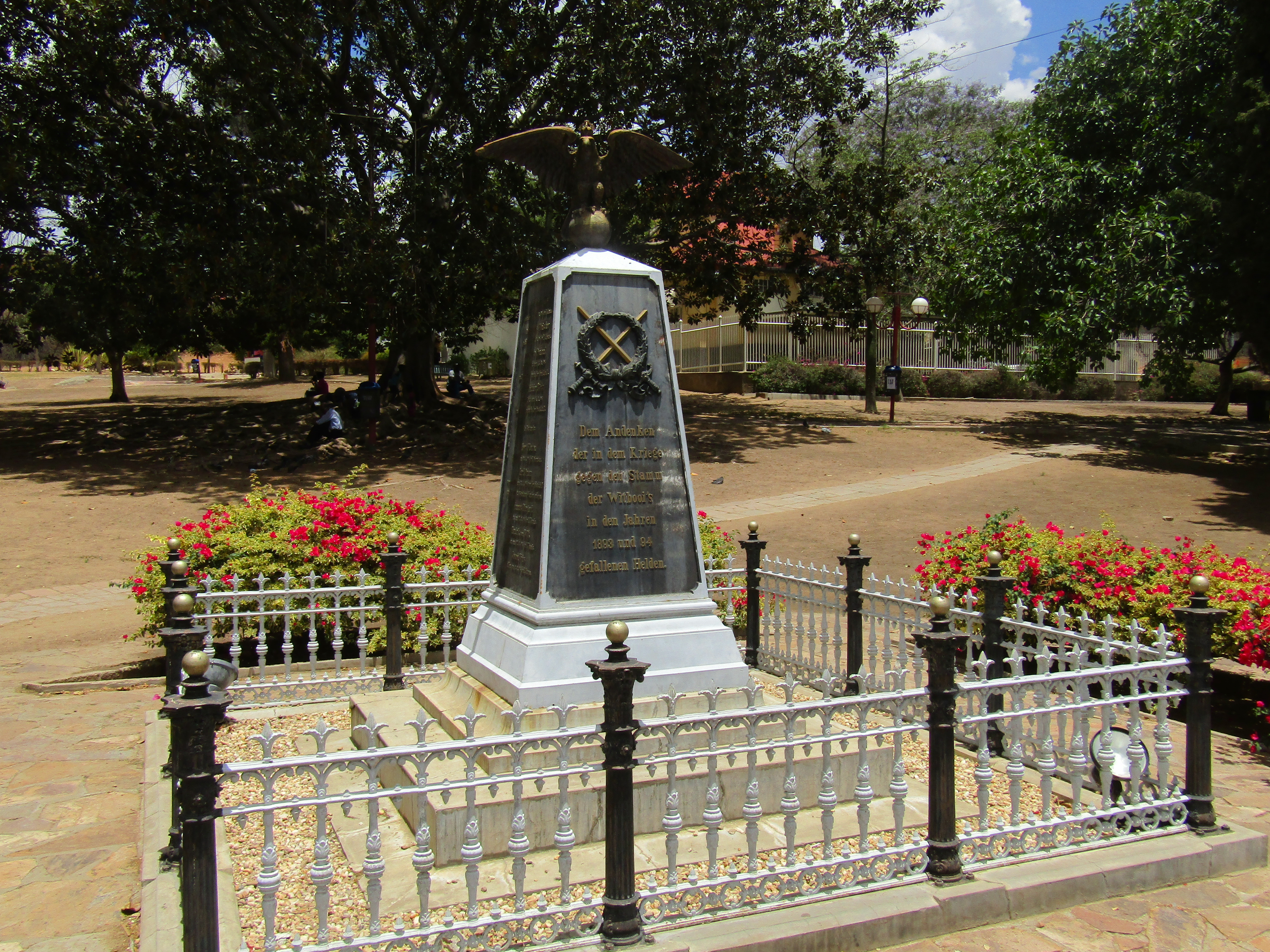 Kriegsdenkmal im Zoo Park in Windhoek, Namibia